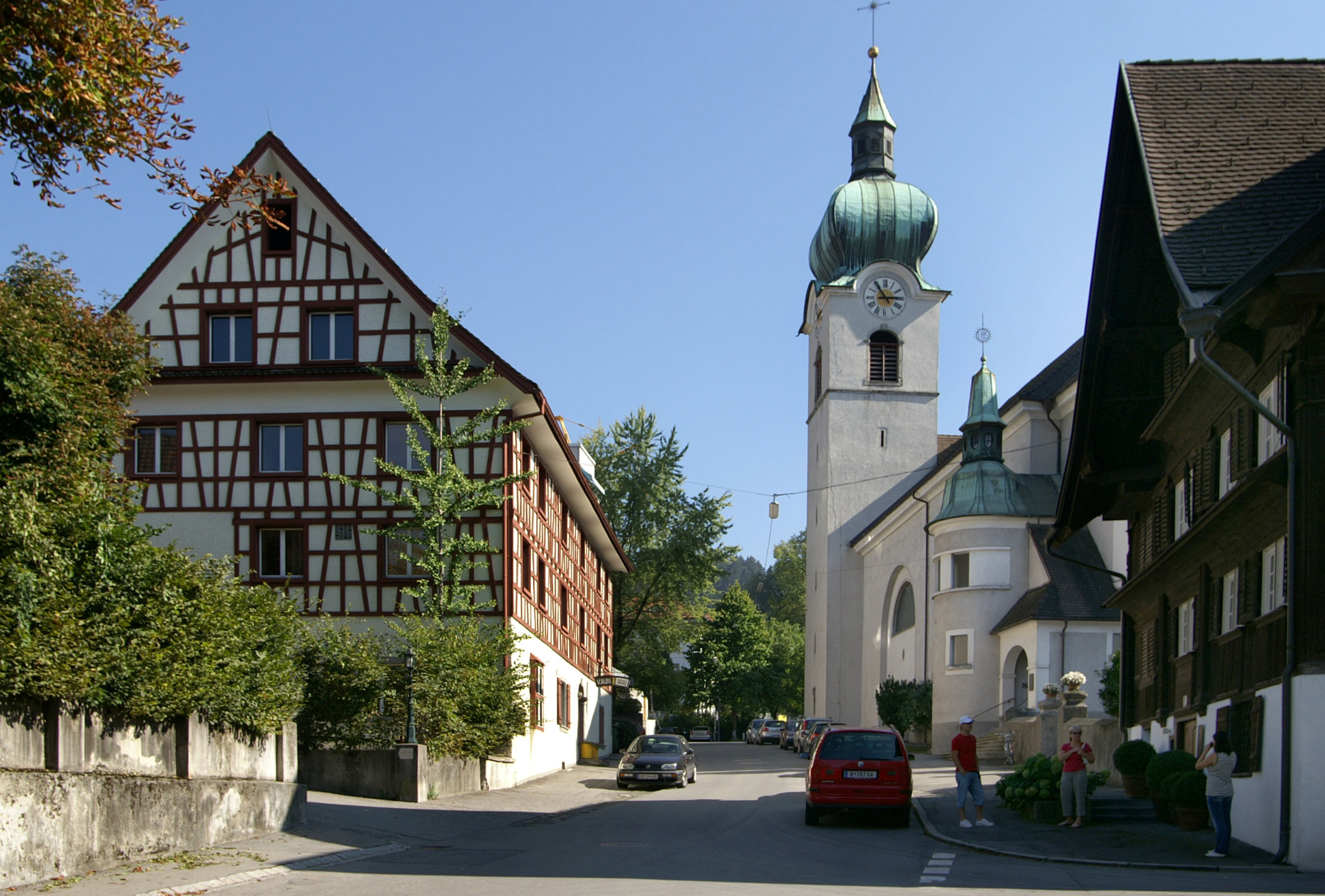 Links, das Fachwerkhaus (ehemals Gasthaus Schlossbräu). Rechts die Stadtpfarrkirche hl.Sebastian im Oberdorf, Dornbirn